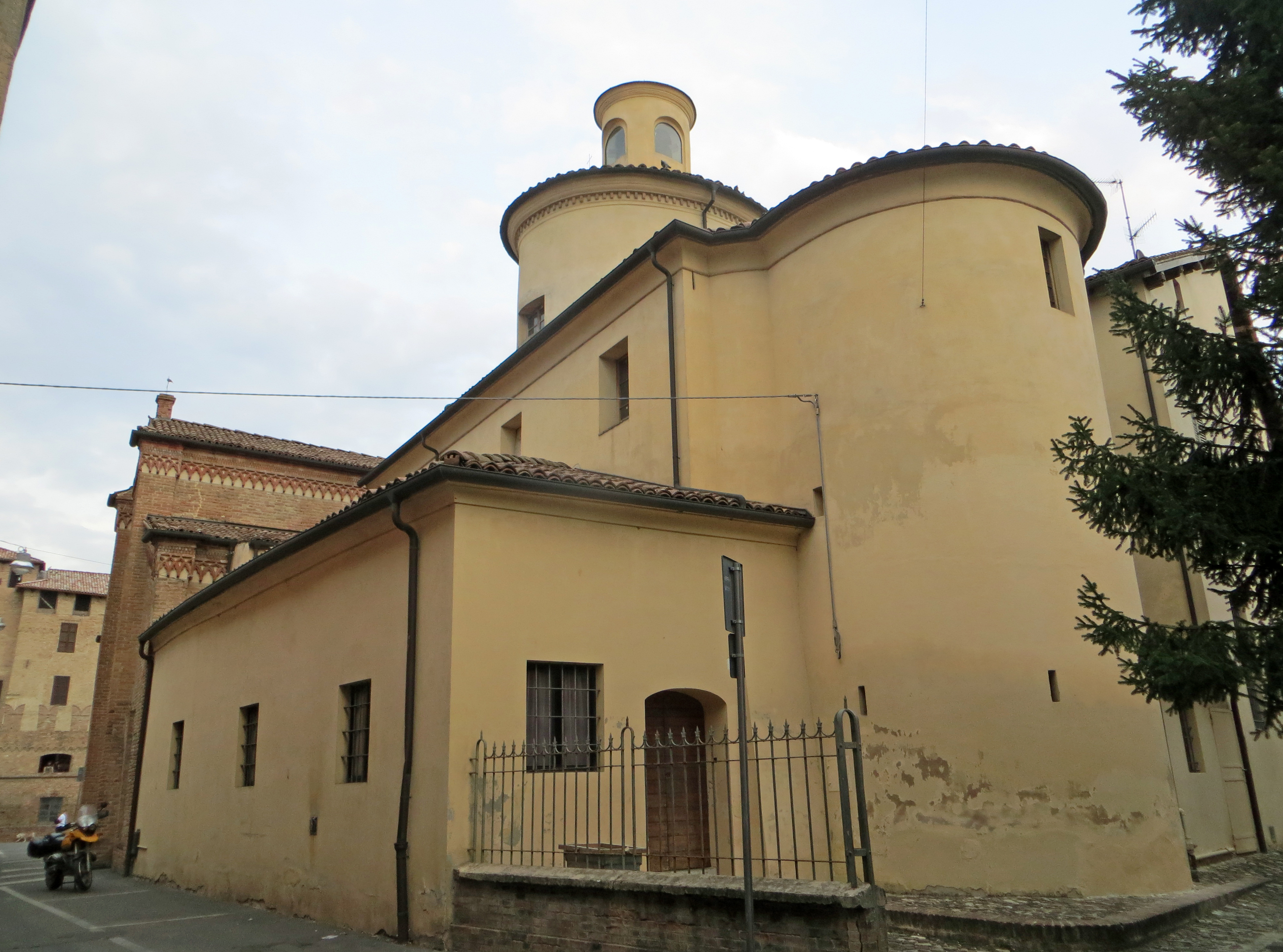 Chiesa di Santa Croce (Fontanellato) - sagrestia